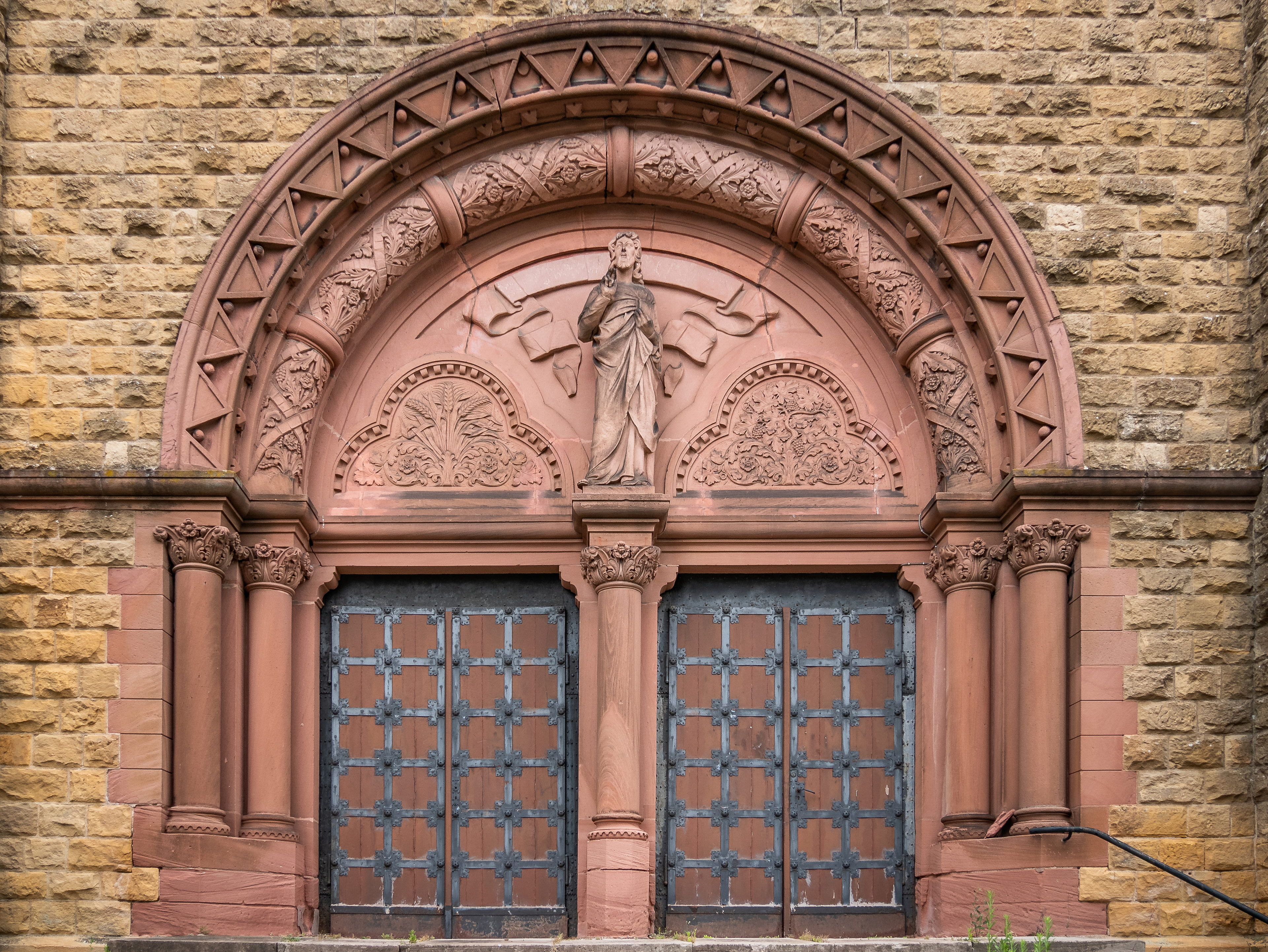 temple protestant de Queuleu